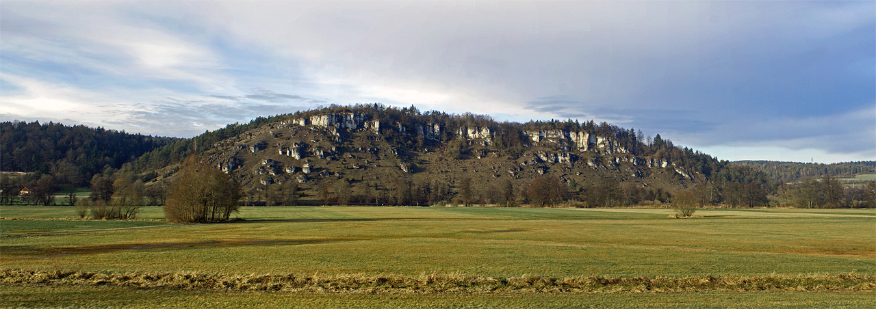 Typische Landschaft im Oberpfälzer Jura. Hier: Jurafelsen bei Kallmünz. Sicht von der Staatsstraße zwischen Burglengenfeld und Kallmünz.